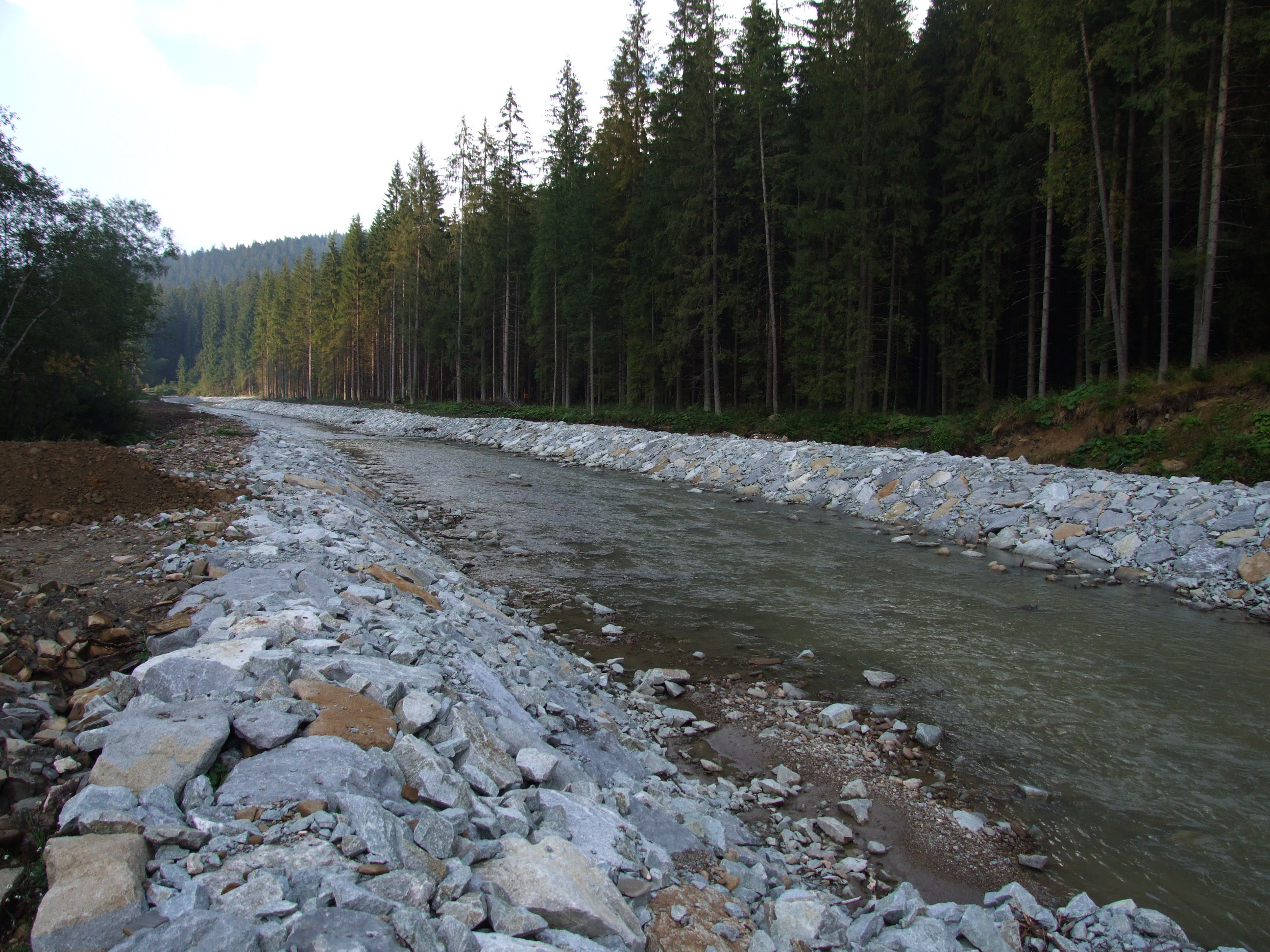 Orawica poniżej Orawic